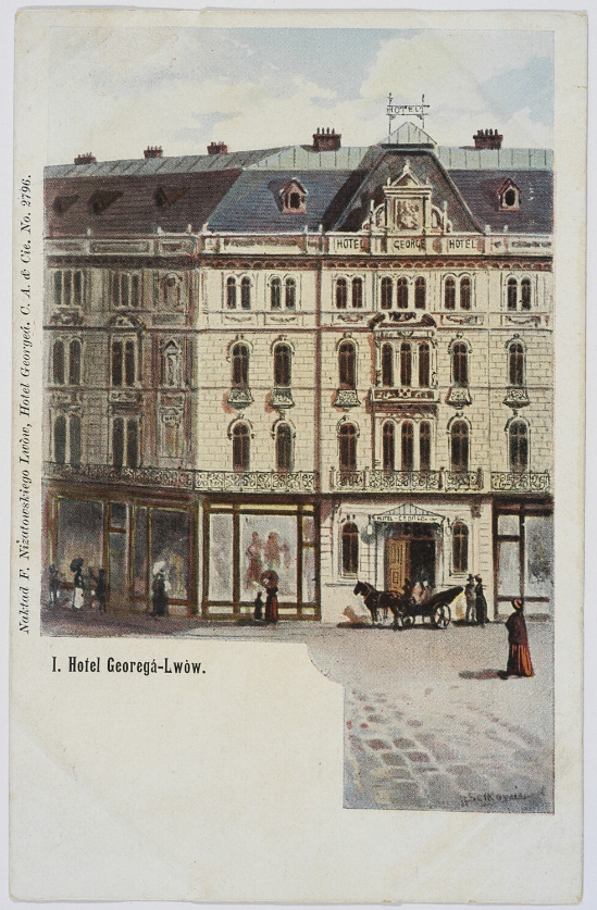 площа Мікевича